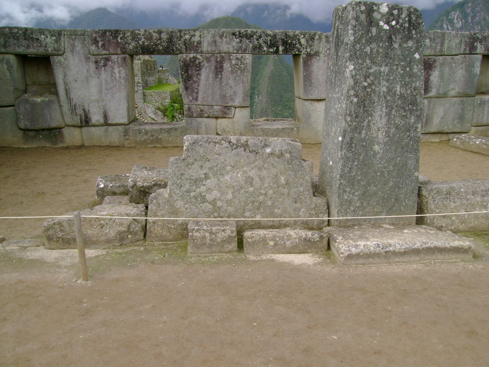 Foto tirada por mim, em Machu Picchu.